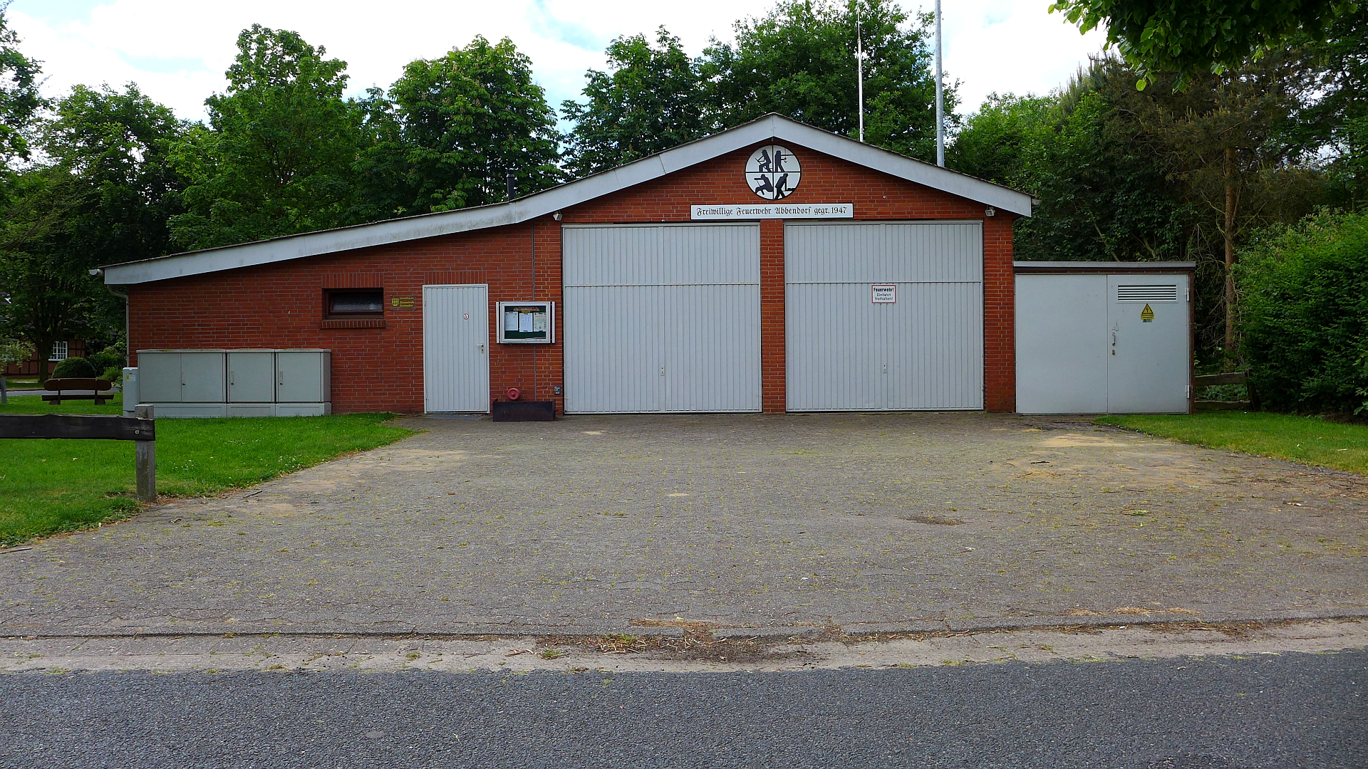 Freiwillige Feuerwehr Abbendorf, Gründungsjahr 1947. Abbendorf ist zugehörig der Gemeinde Scheeßel.